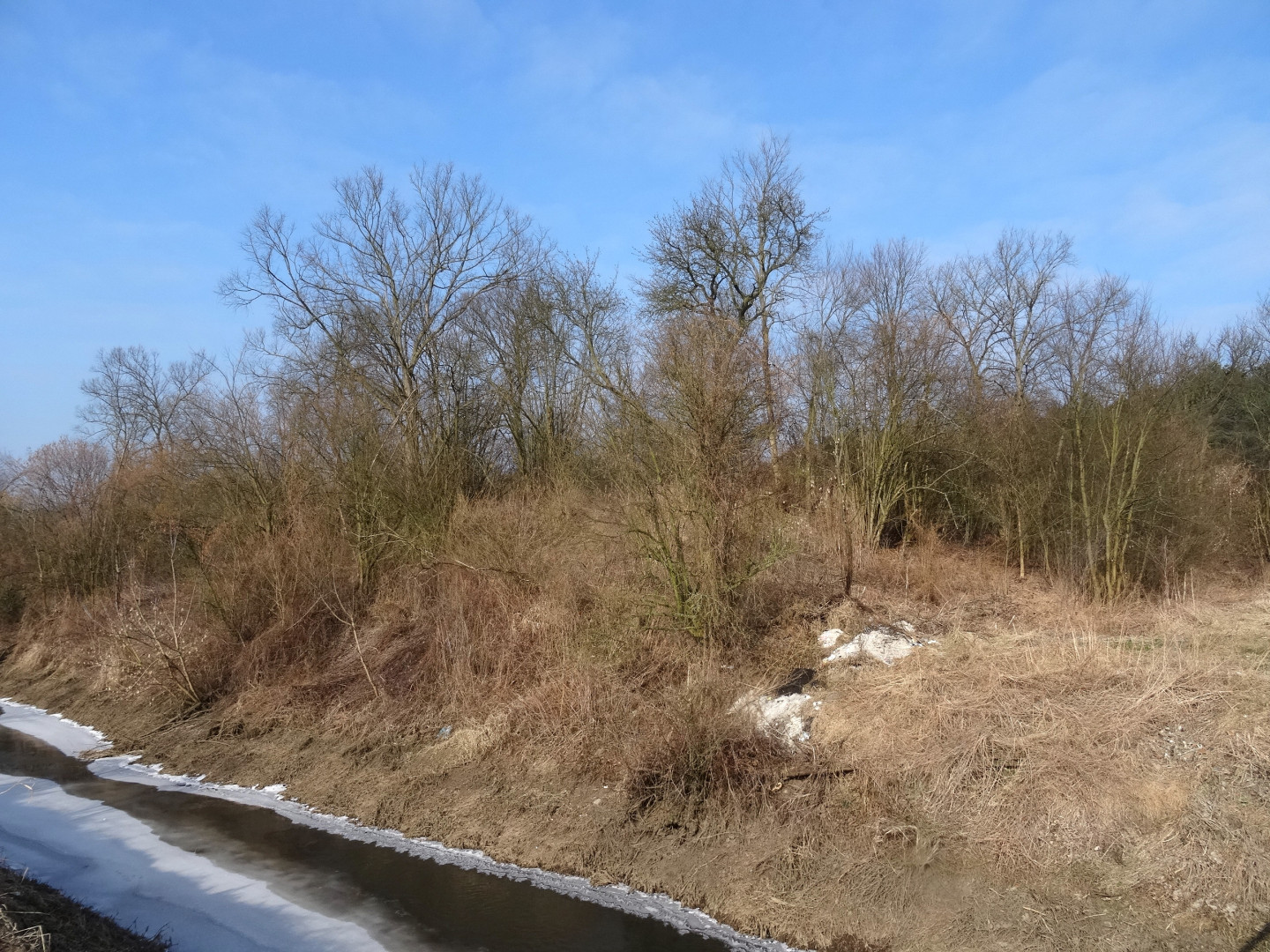 Grodzisko Kamieniec nad Wisłą we wsi Czarnowo k. Bydgoszczy